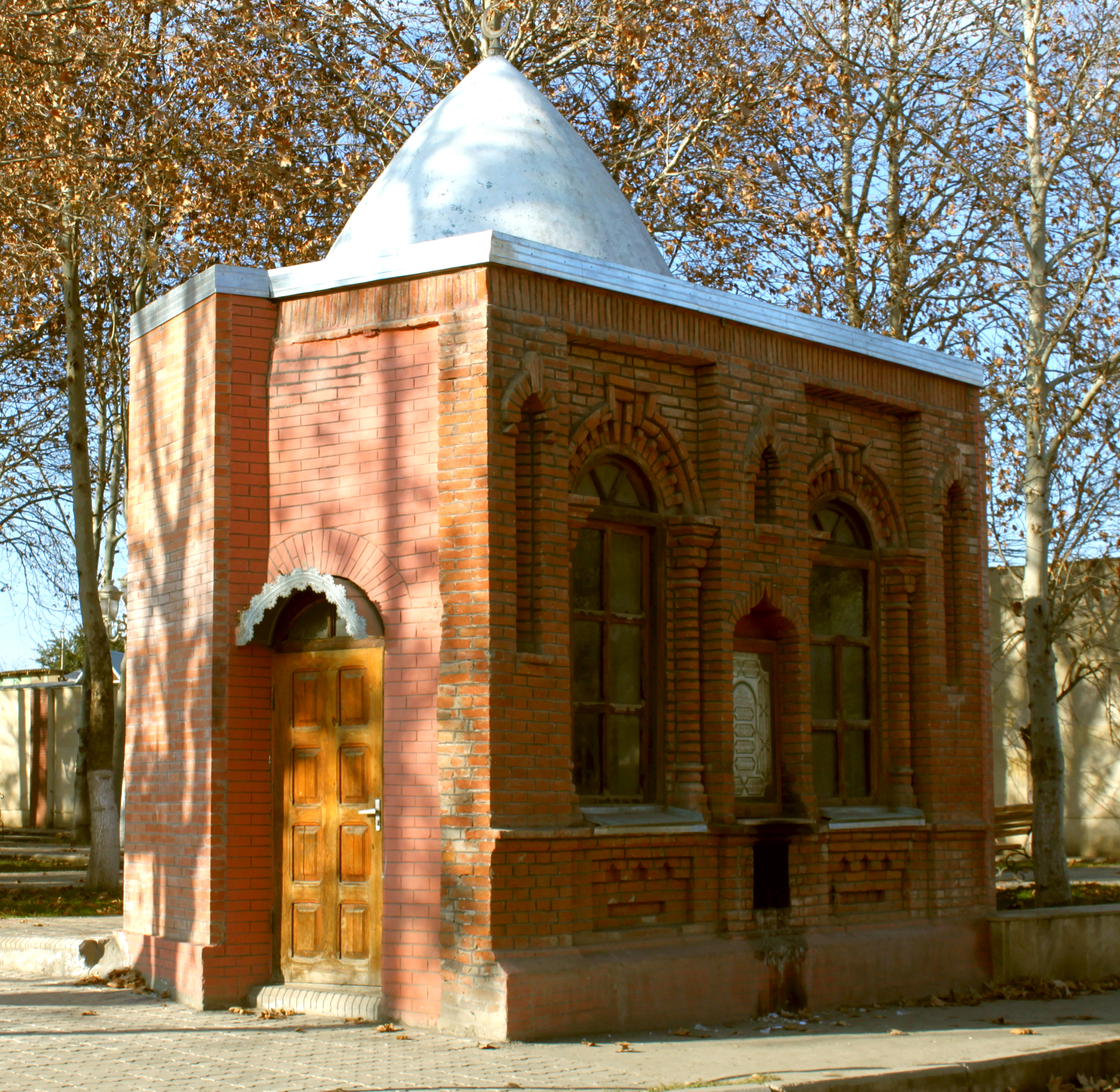 Seyid Mirzə Bağır Ağa türbəsi